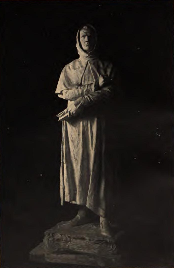 Statua di Cecco d'Ascoli modellata dallo scultore Giuseppe Inghilleri di Roma (1870 – 1935).